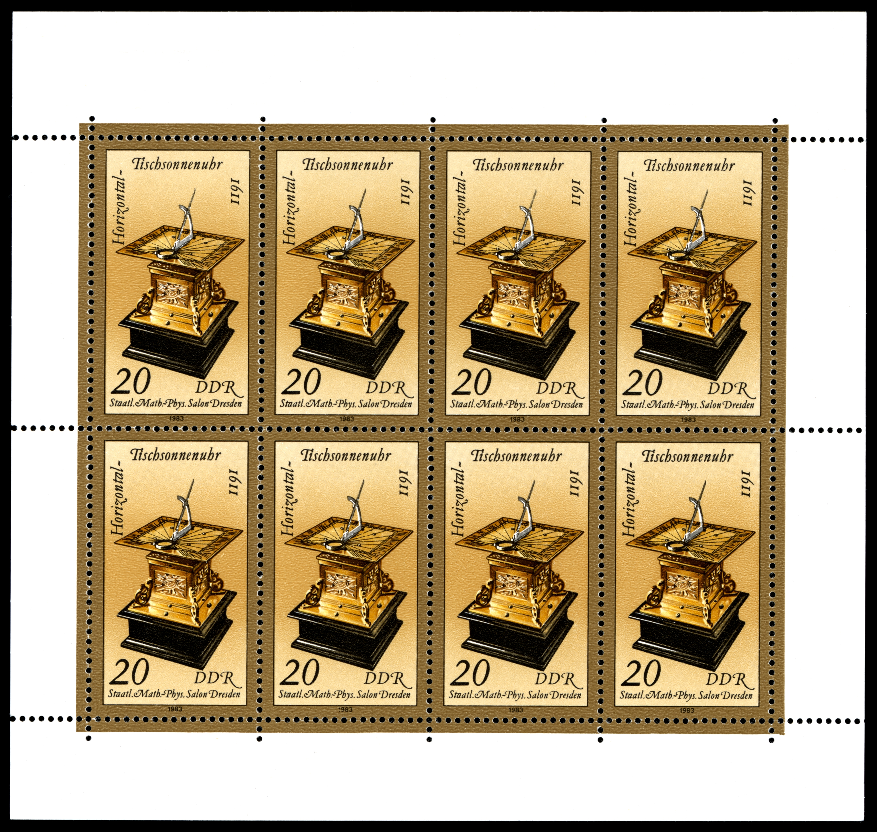 Information: Ausgabepreis: Pfennig First Day of Issue / Erstausgabetag: Auflage: Entwurf: Druckverfahren: Michel-Katalog-Nr: Ländercode-MiNr